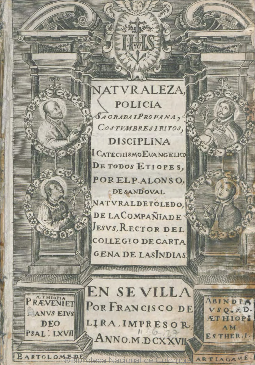 Portada calcográfica de Naturaleza, policia sagrada i profana: costumbres i ritos, disciplina i catechismo evangélico de todos etíopes de Alonso de Sandoval, impreso en Sevilla por Francisco de Lira, 1627